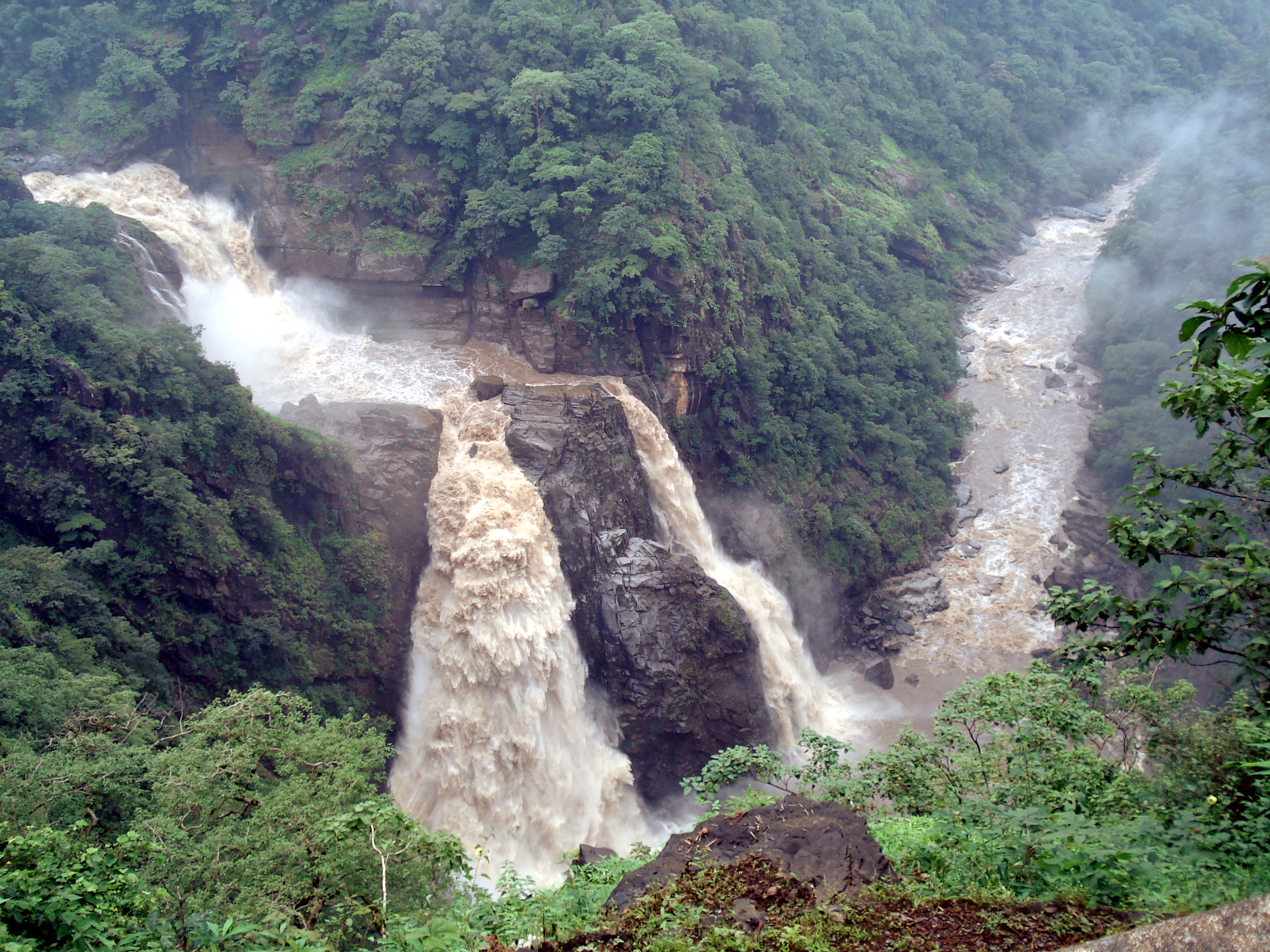 Magod Falls in Karnataka (India)